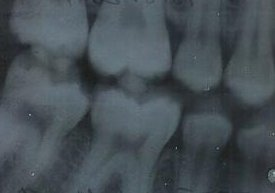 Zdravé zuby